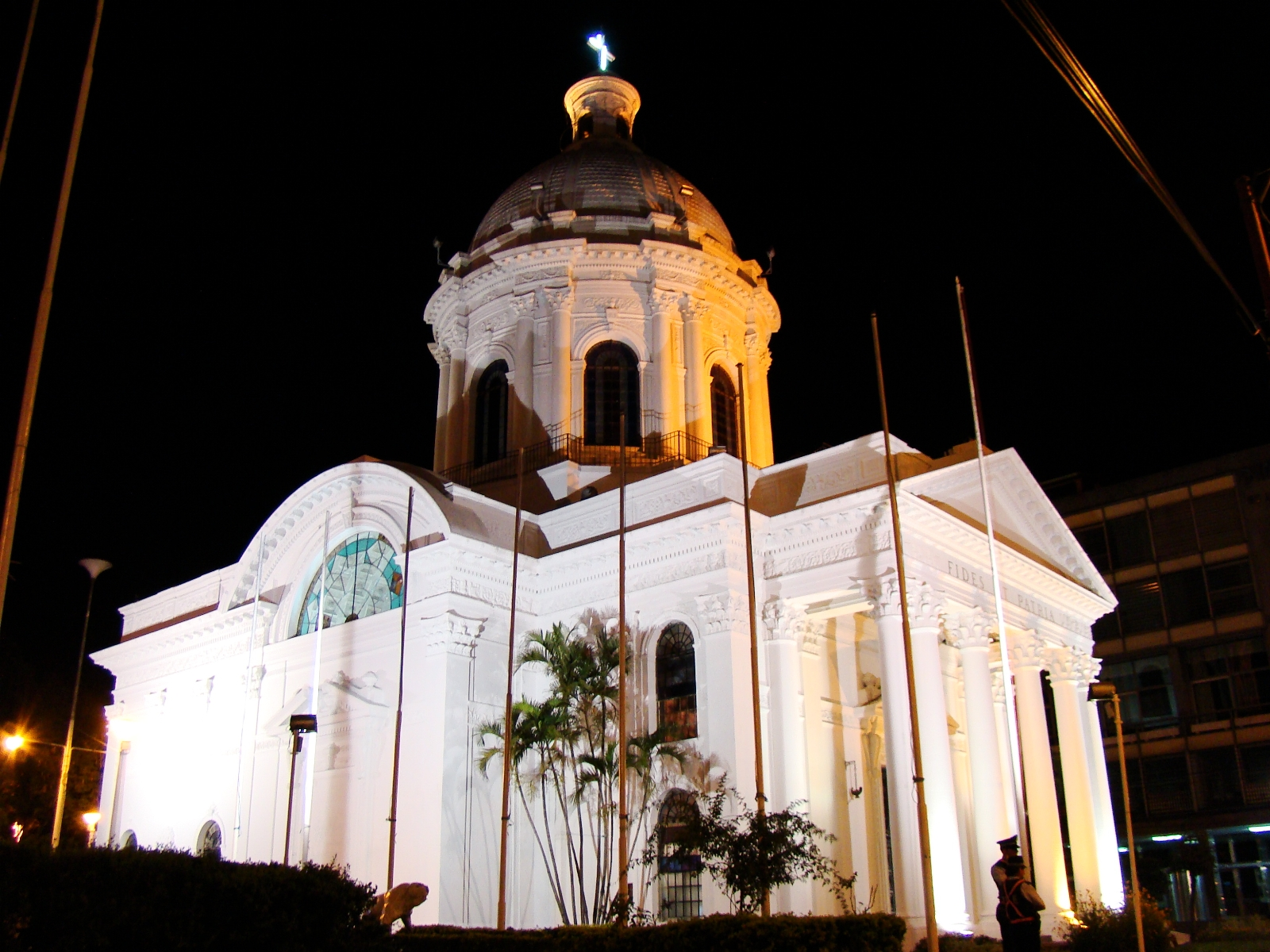 Panteón de Los Héroes, vista nocturna. Vista de la ciudad de Asunción; la capital de la república del Paraguay. Panteón de Los Héroes, una pequeña versión de Les Invalides de París.